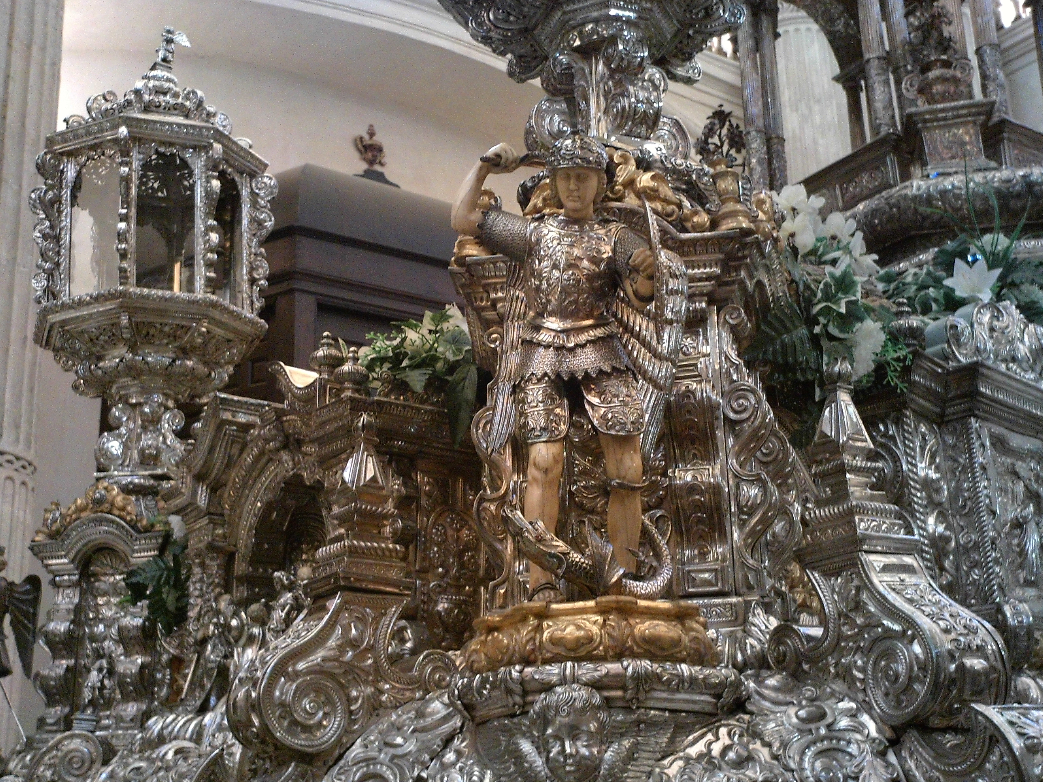 San Miguel Arcángel. Paso de Jesús de Pasión. Sevilla, Andalucía, España.